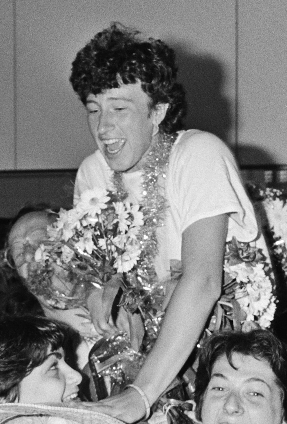 Dameshockeyploeg na het behalen van de wereldbeker op Schiphol. Marjolein Eijsvogel op de schouders